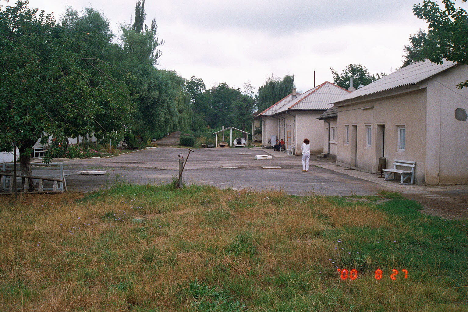 Torget som utgör leprakolonins centrum